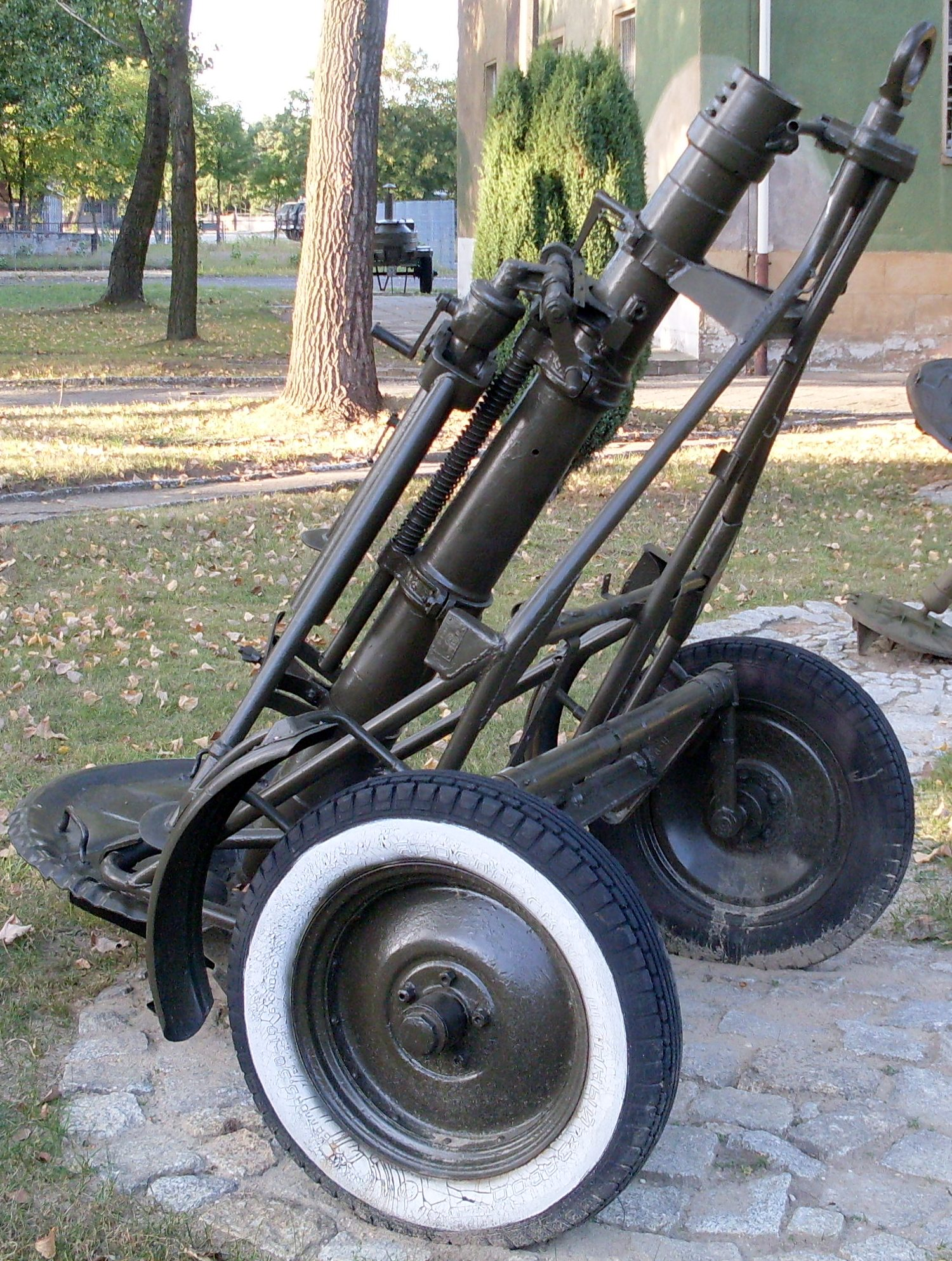 120 mm moździerz wzor 1938/41